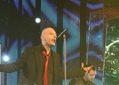 Ристо Апостолов - Избор на песна за евровизија 2011